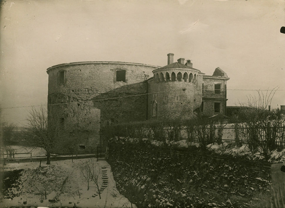 Suur Rannavärav This image on crowdsourcing geotagging platform Ajapaik